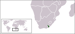 Description:Carte de localisation du Ciskei, Afrique du Sud Auteur:Rémih